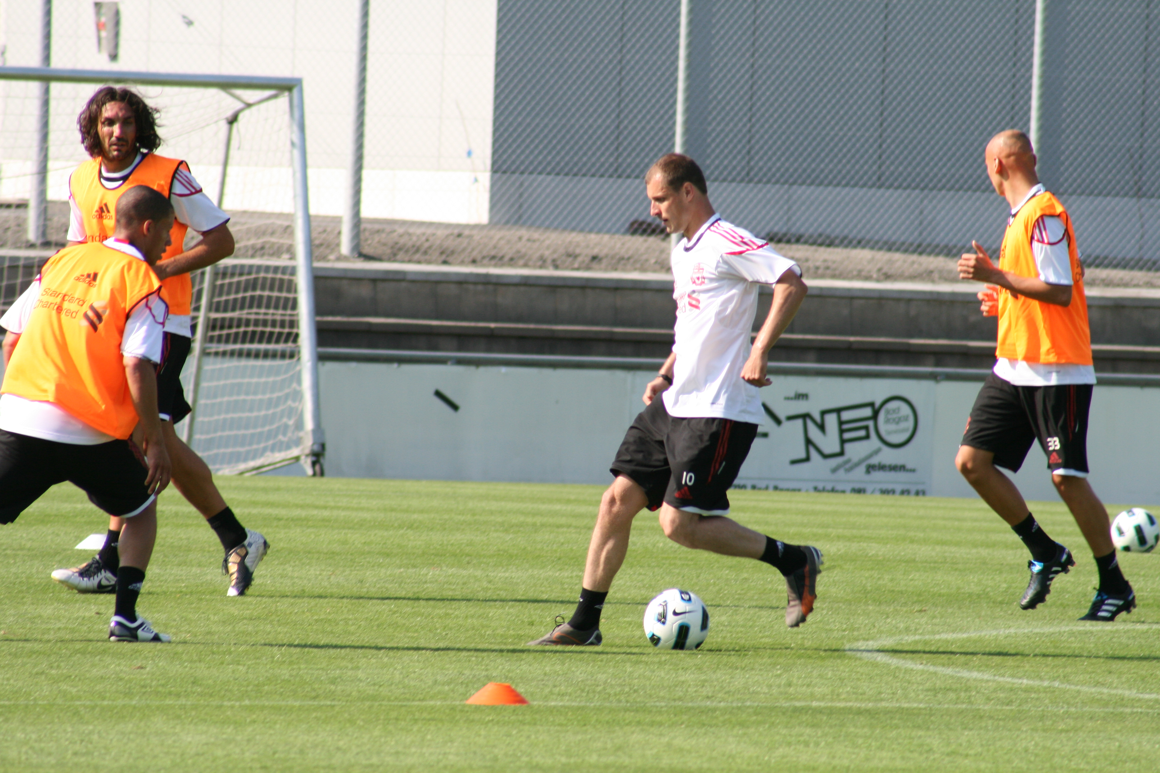 Milan Jovanovic à l'entrainement avec le FC Liverpool.